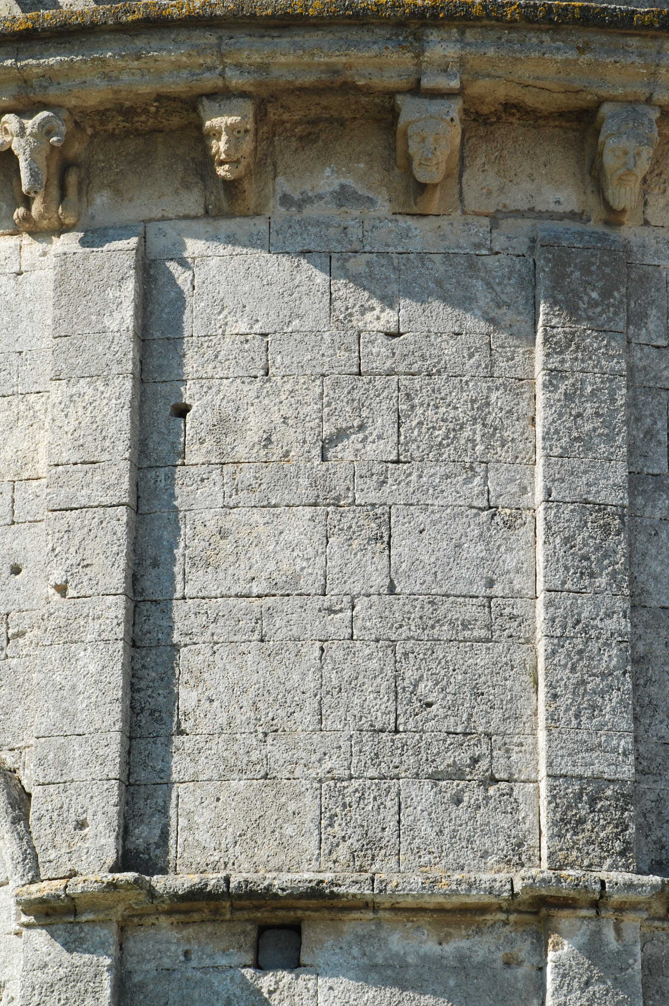 France - Languedoc - Hérault - Église Saint-Laurent de Lattes - Opus monspelliensis du chevet